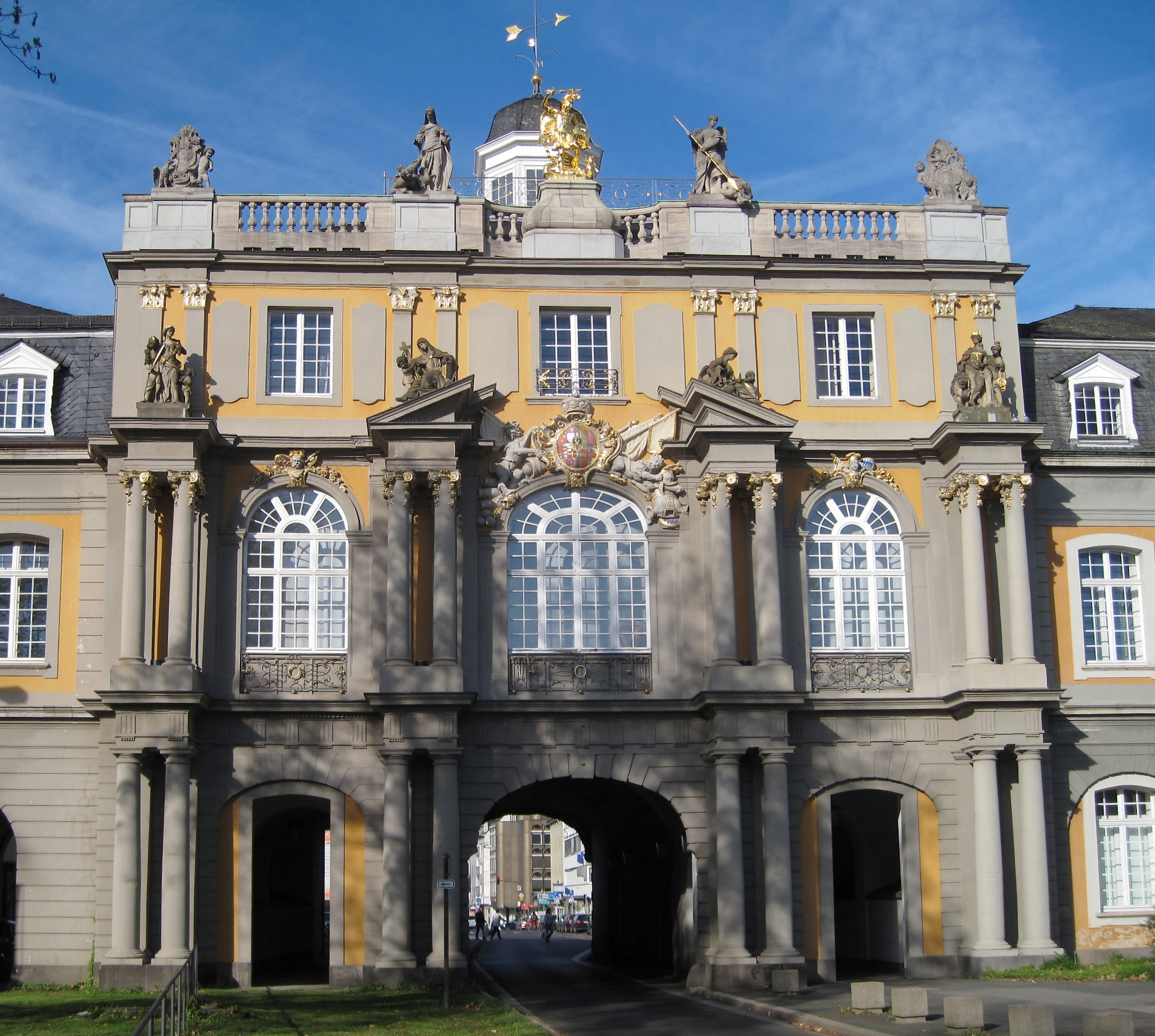 Barocker Ostflügel des kürfürstlichen Schlosses mit Koblenzer Tor in Bonn-Zentrum, Stockenstraße/Ecke Regina-Pacis-Weg.